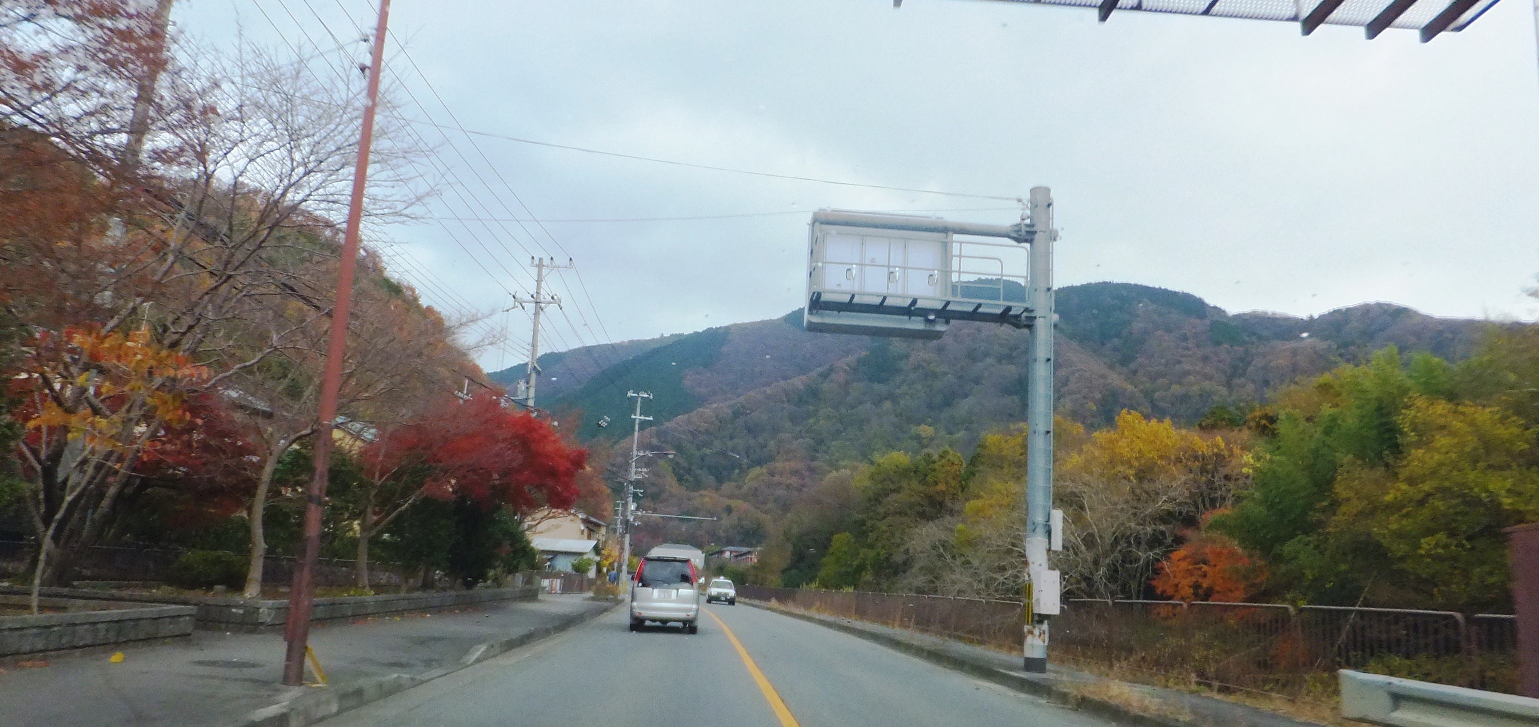 京都府京都市左京区上高野水車町 国道367号